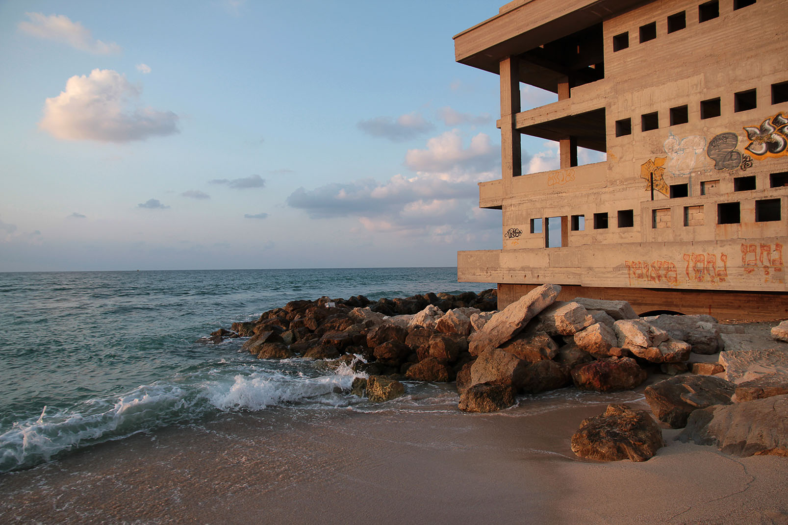 קזינו בת גלים היה מבנה בשכונת בת גלים בחיפה ששימש לפעילויות קהילה ופנאי משנות ה-30 של המאה ה-20, אך נהרס לאחר שנים, וכיום ניצב במקומו שלד בטון. חרף שמו, לא שימש המקום מעולם כקזינו.